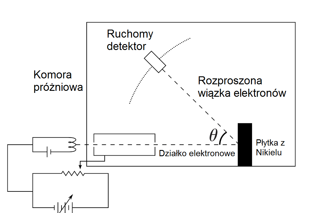 Ilustracja obrazująca budowę doświadczenia